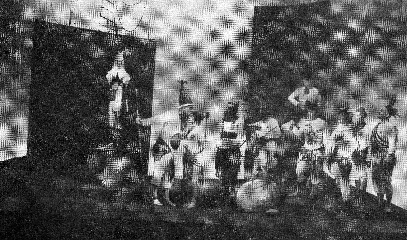 Komentarz do podróży Cooka w Teatrze w Kielcach.